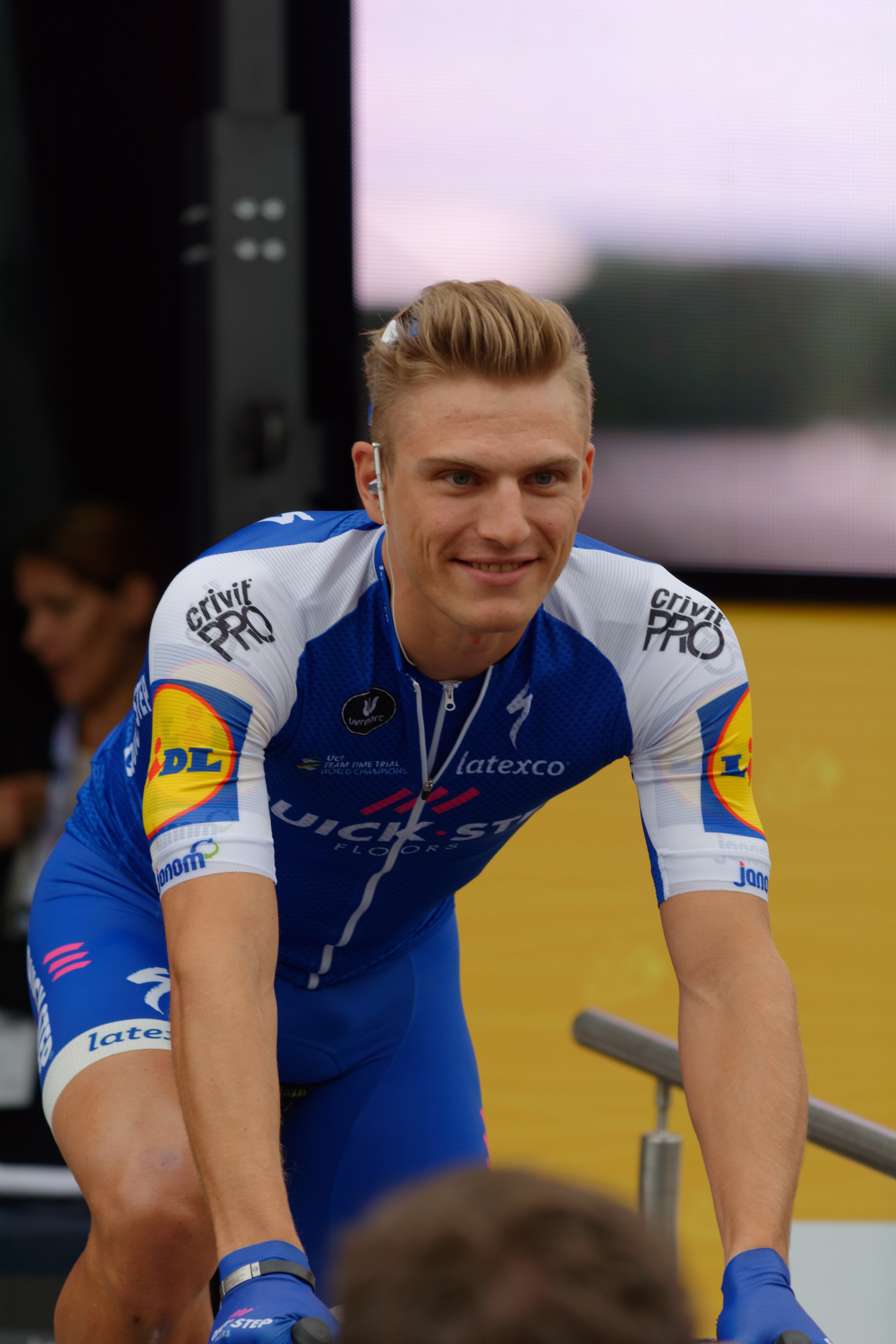 Tour de France 2017 Stage 2 Duesseldolf